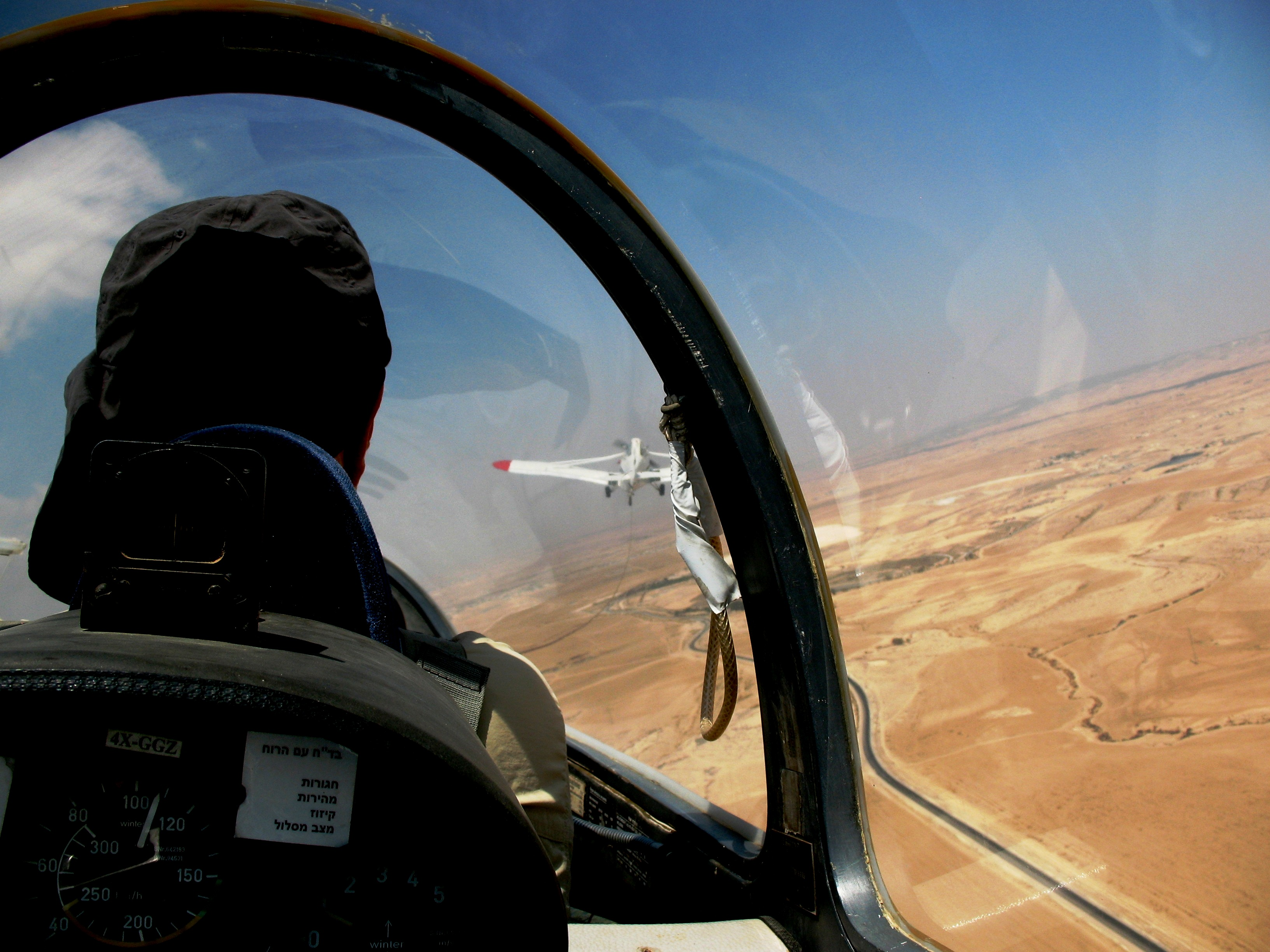 מטוס גורר דאון